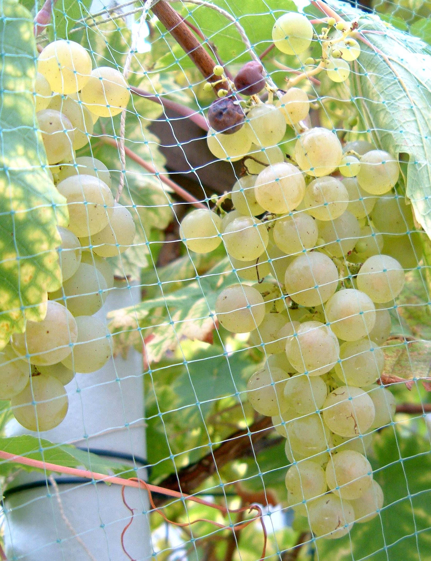 Netz gegen Traubenräuber